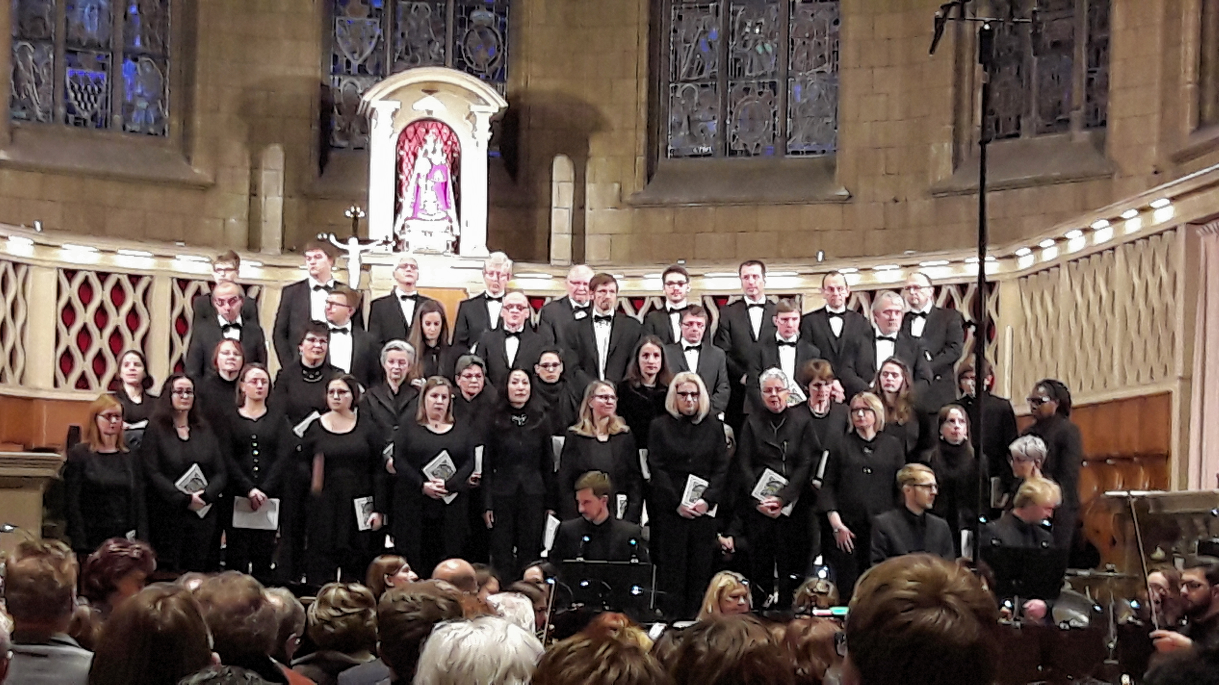 Maîtrise Ste Cécile de la Cathédrale de Luxembourg